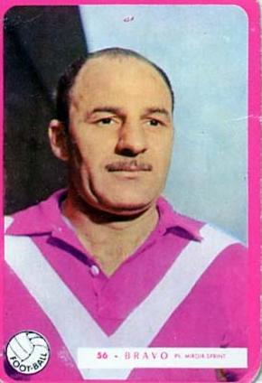 Ruben Bravo en RC Roubaix